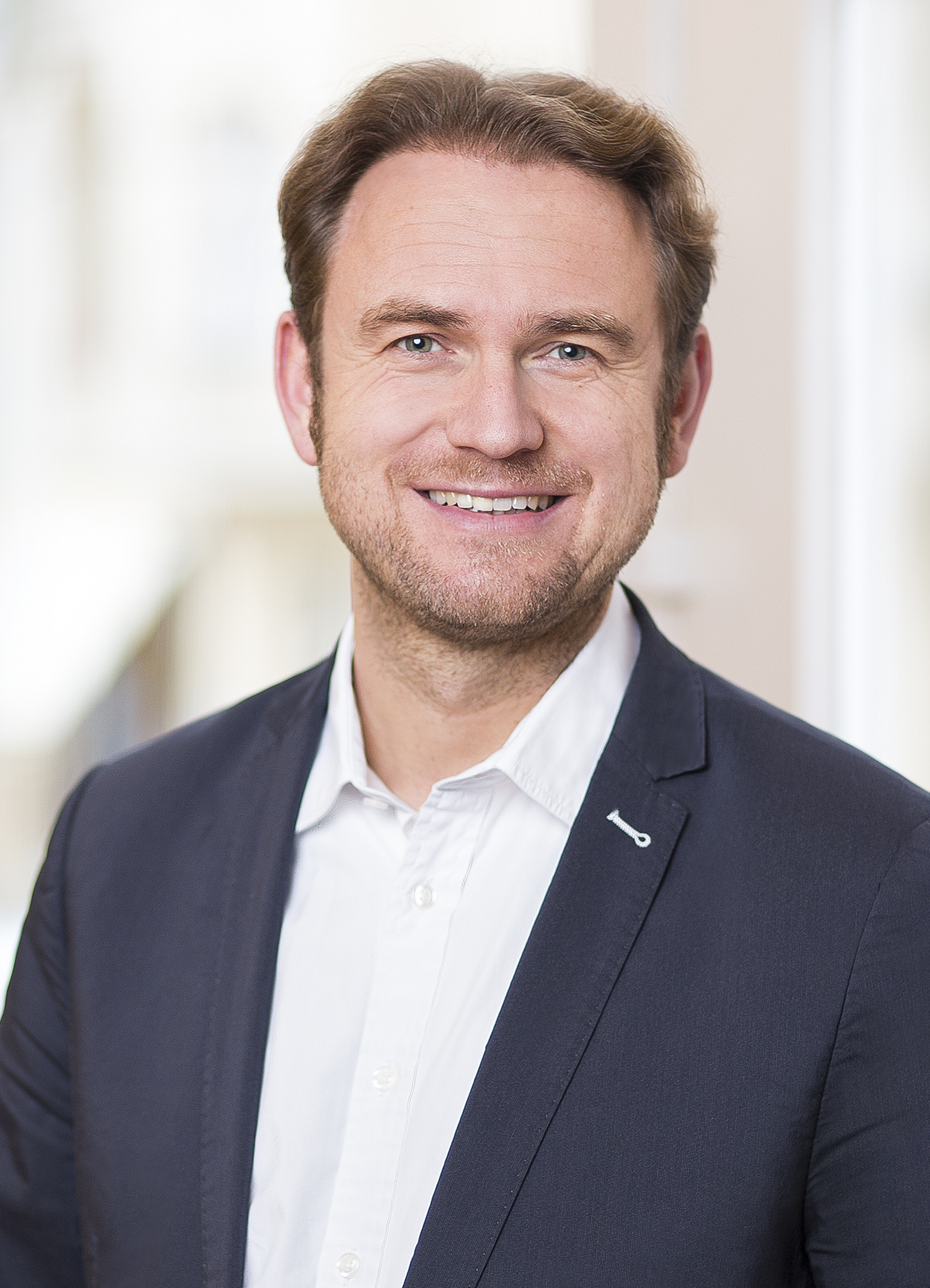 Portraitfoto von Julian Kawohl, 2015.